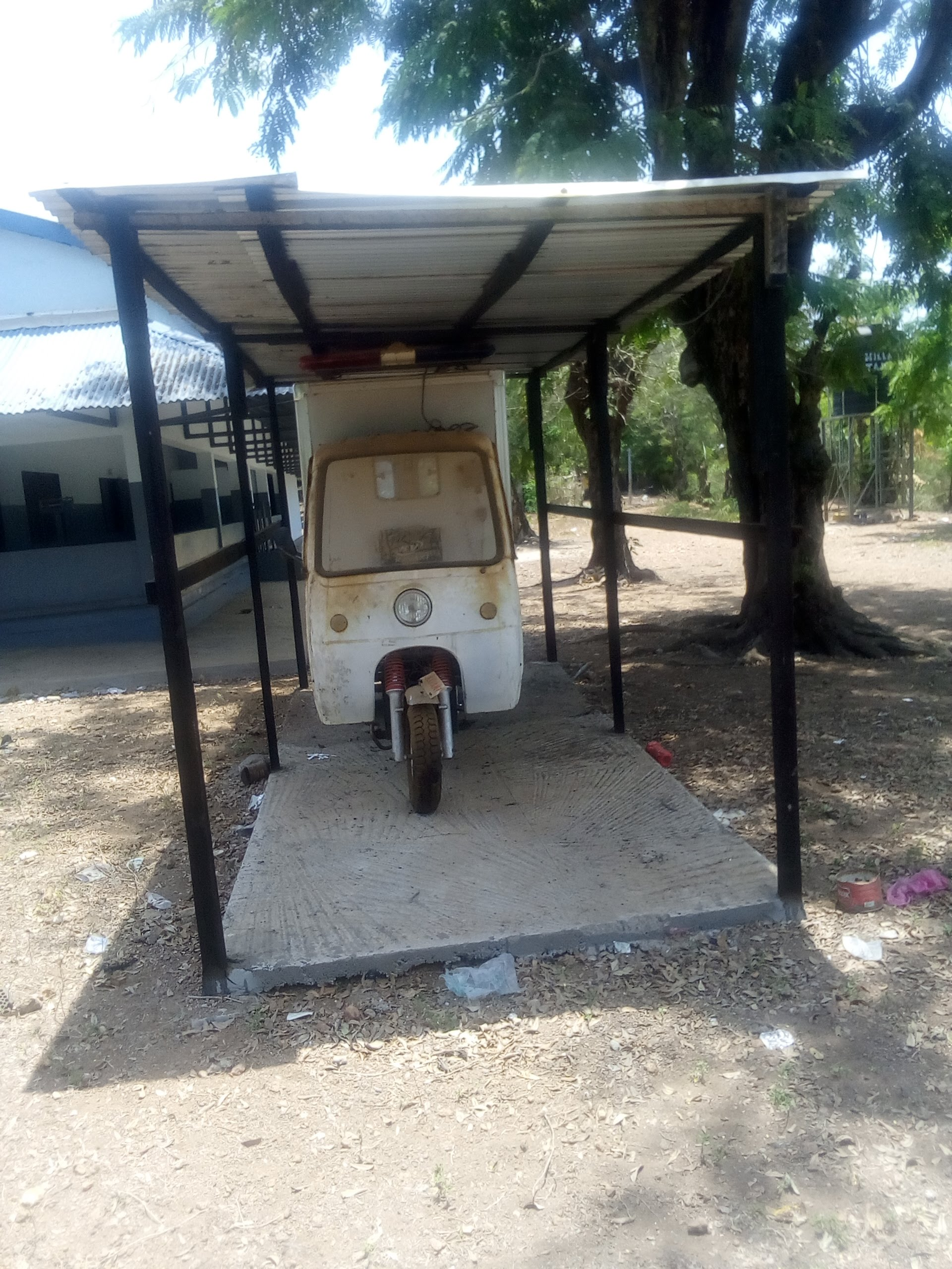 Ambulance communautaire de kassa This is an image with the theme "Africa on the Move or Transport" from: Guinea